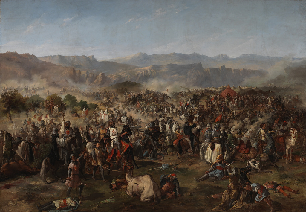 Esta obra, que fue depositada por el Museo del Prado en 1878 en el Palacio del Senado de España, representa la batalla de las Navas de Tolosa, que se libró el día 16 de Julio de 1212 en las cercanías del municipio jienense de Santa Elena. Y es conocida también como la batalla de los tres reyes, ya que en ella combatieron los monarcas Alfonso VIII de Castilla, Pedro II de Aragón y Sancho VII de Navarra.